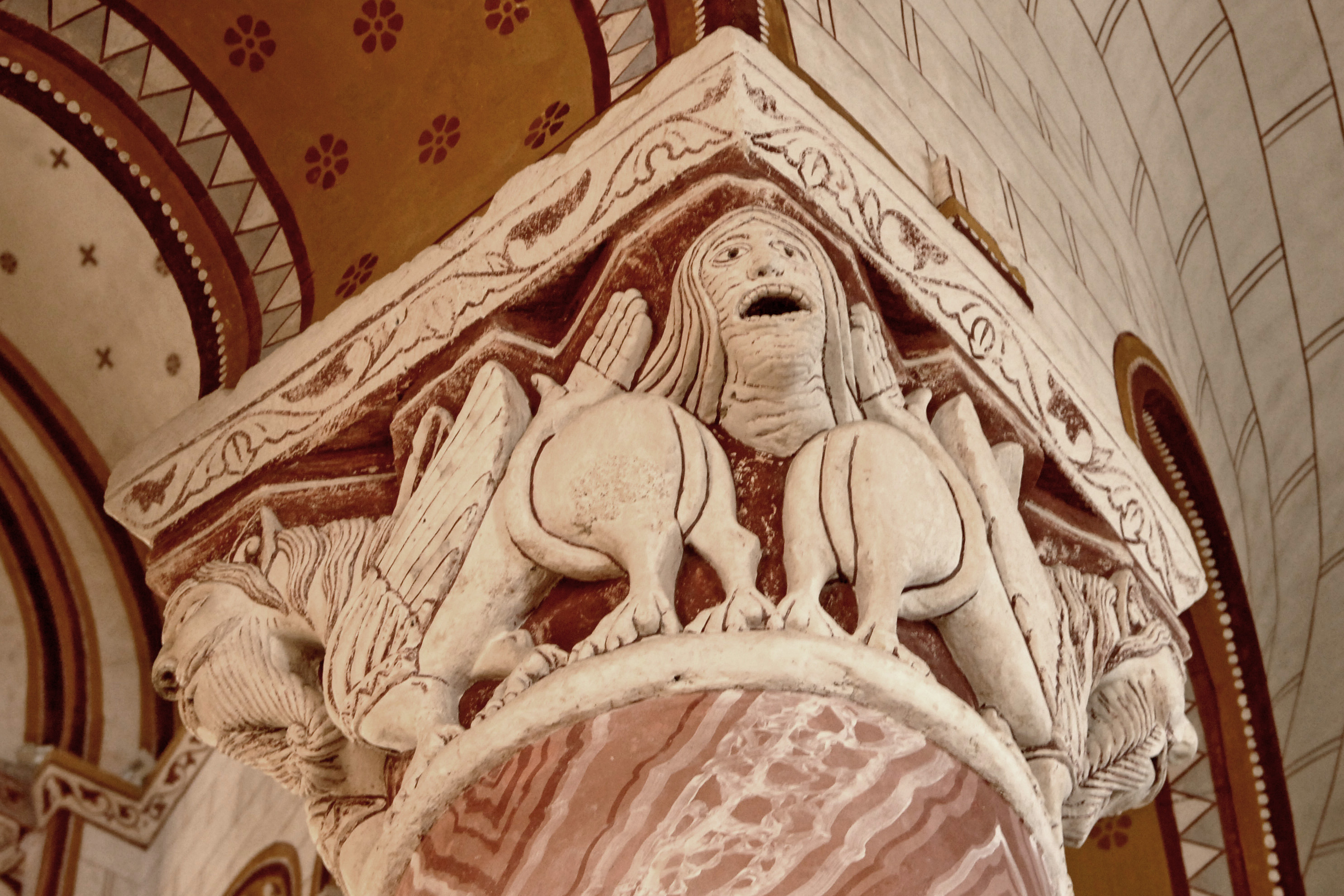 Kapitell V